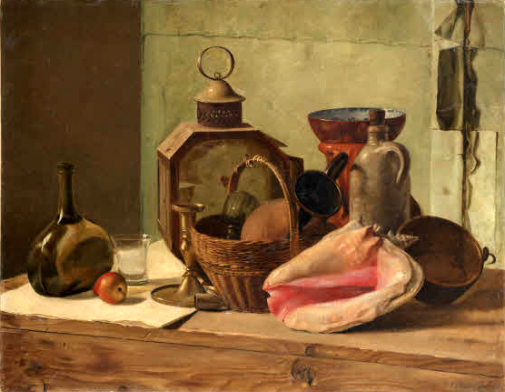 Diese - hier nur bescheiden kleine - digitale Wiedergabe eines Ölgemäldes aus dem Besitz der Museumslandschaft Hessen Kassel zeigt das Ölgemälde des Malers und späteren Fotografen Ferdinand Tellgmann unter dem Titel Stillleben. Das Werk ist rückseitig signiert und datiert 1833. Zum Werk vermerkt die Besitzerin: „Auf einem Tisch sind vor einem grün bespannten Rahmen verschiedene Flaschen, Gläser, eine rosafarbene Muschel und ein Messingleuchter arrangiert. Vermutlich handelt es sich auch hier um eine in der damaligen Zeit übliche Akademie-Aufgabe, ähnlich wie bei den Stillleben von Johannes Wimmel (vgl. AZ 409) und Eduard Stiegel (vgl. AZ 664). In der realistischen Wiedergabe einfacher Geräte wird die stilistische Nähe zu Stiegel deutlich.“ ...